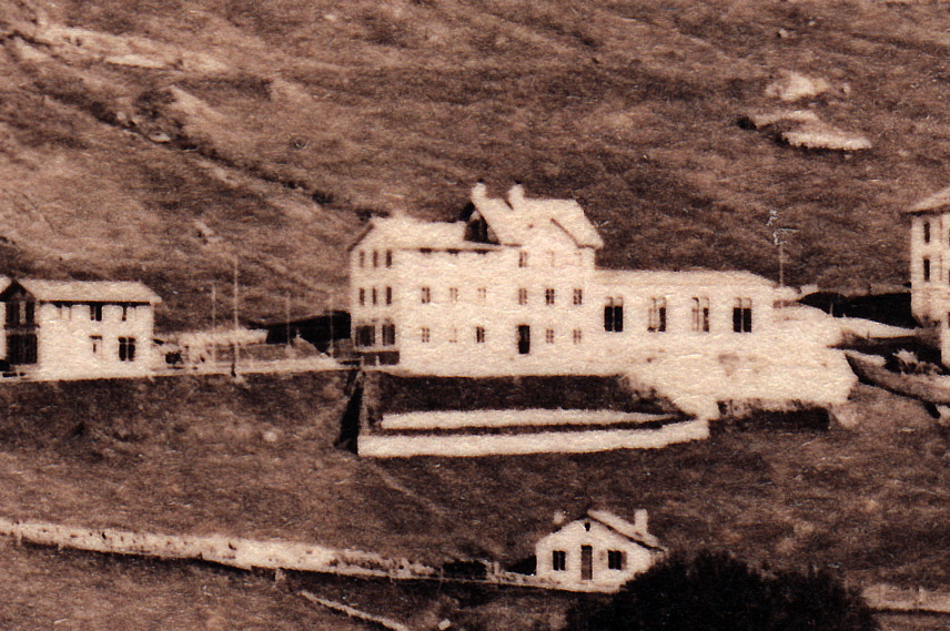 Pontresina 1880: ehemaliges Haus des Fotographen Alexander Flury, Fremdenpension Maison Stiffler und das sich im Bau befindliche Hotel Pontresina; vergrösserter Ausschnitt